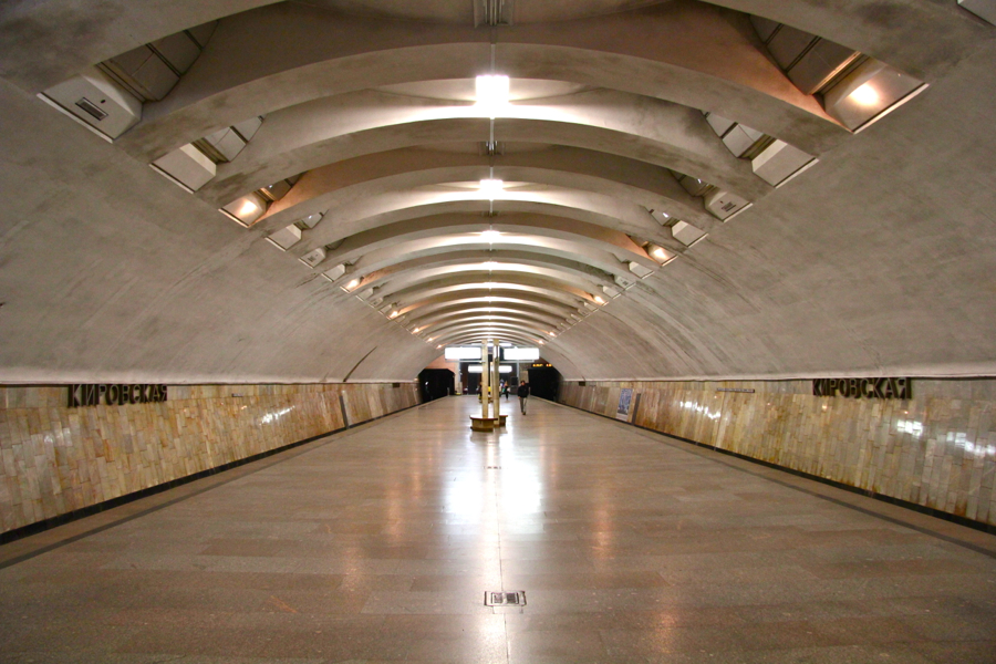 Samara Metro (Самарский метрополитен)